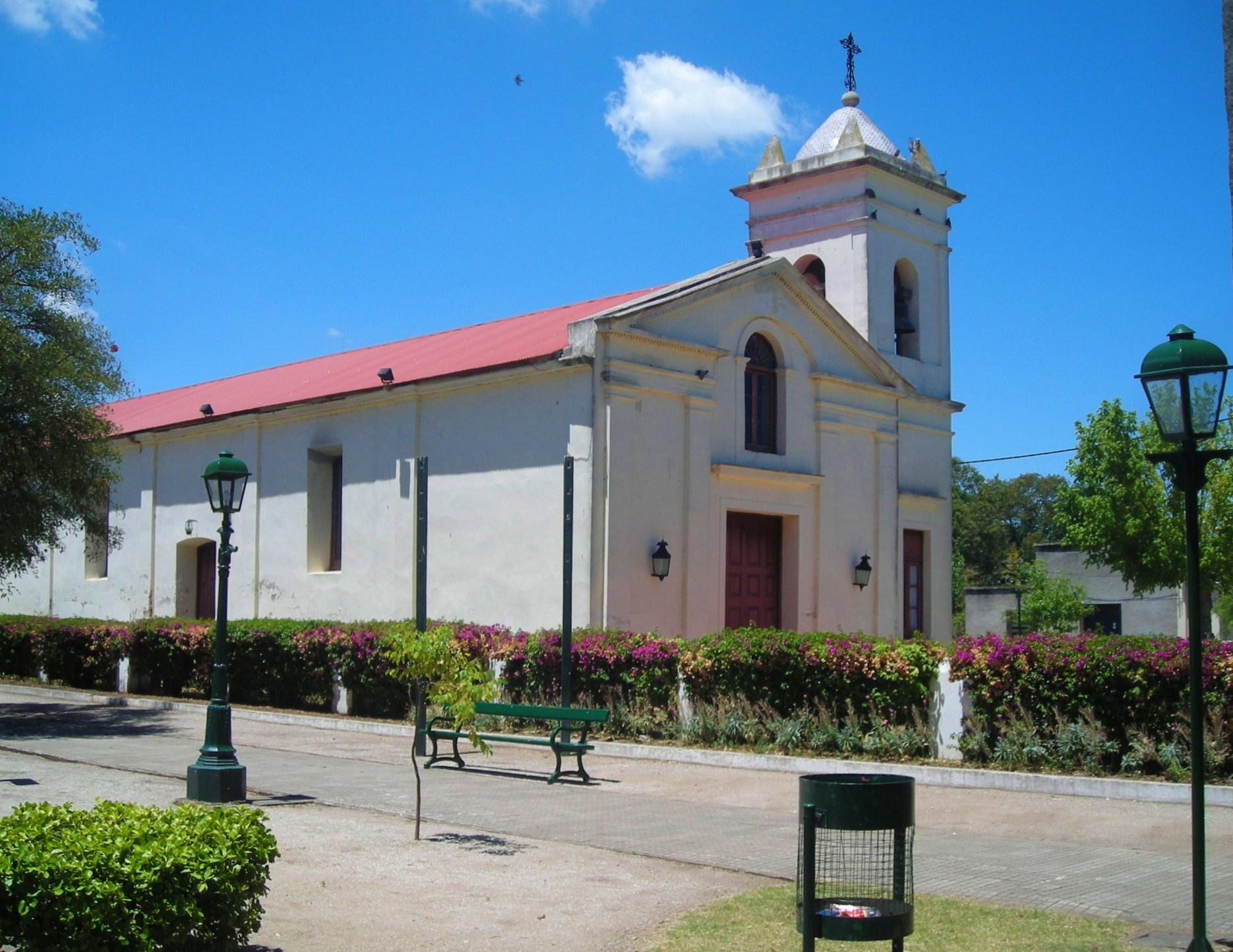 Capilla de Santo Domingo de Soriano. Ubicada en el departamento de Soriano